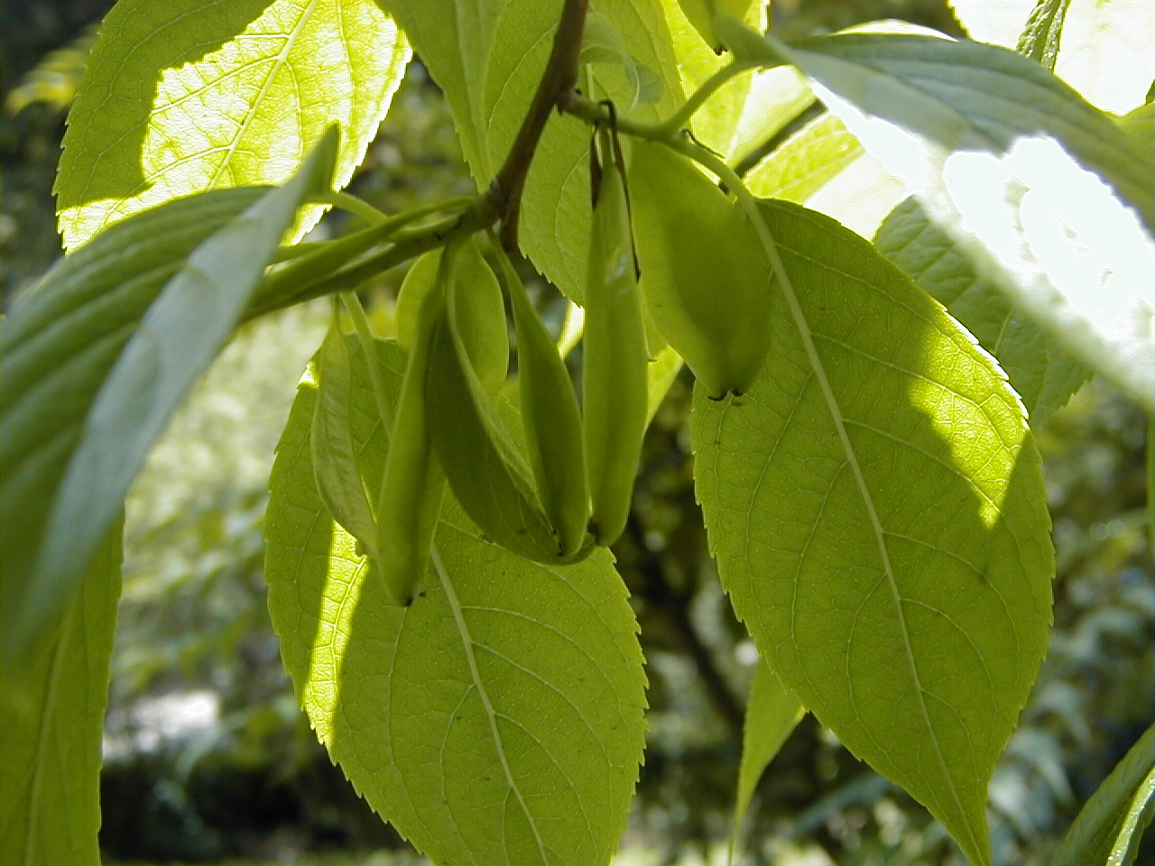 Eucommia ulmoides, frutos. Real Jardín Botánico, Madrid